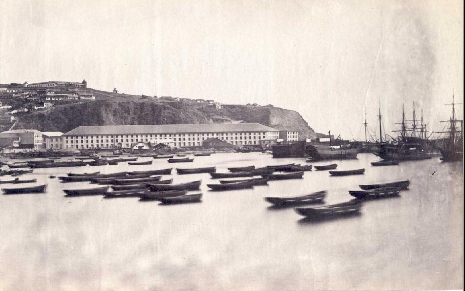 Fotos históricas de Valparaíso en Chile